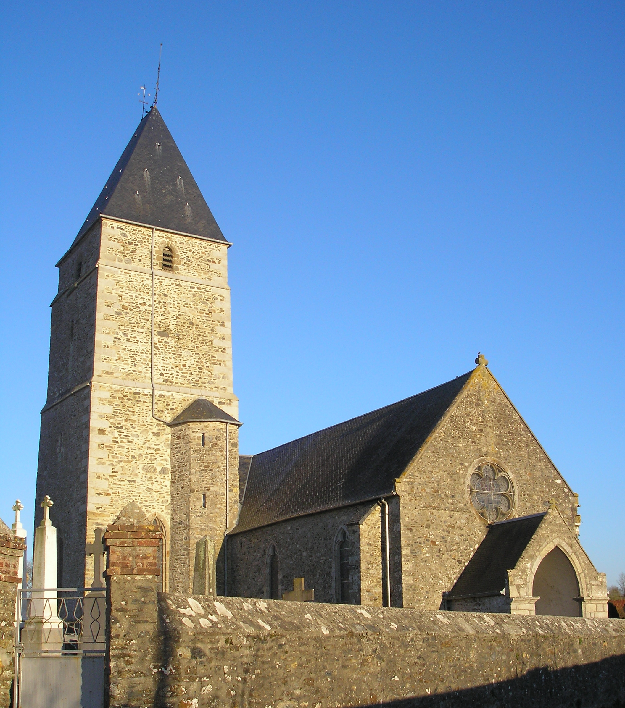 Courcy (Manche, Normandie, France). L'église Saint-Lô.